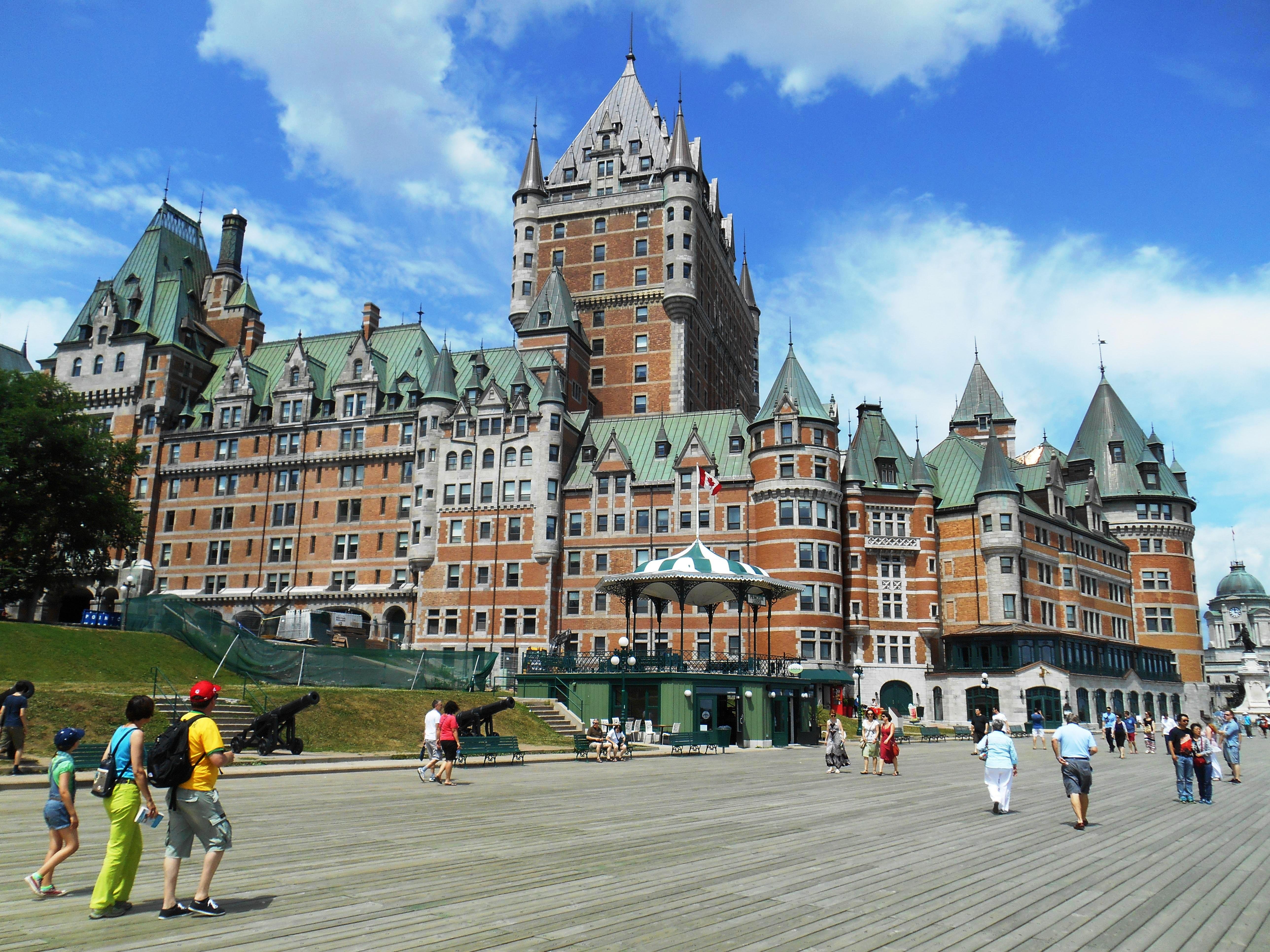 Château Frontenac, vu de la terrasse Dufferin, Québec